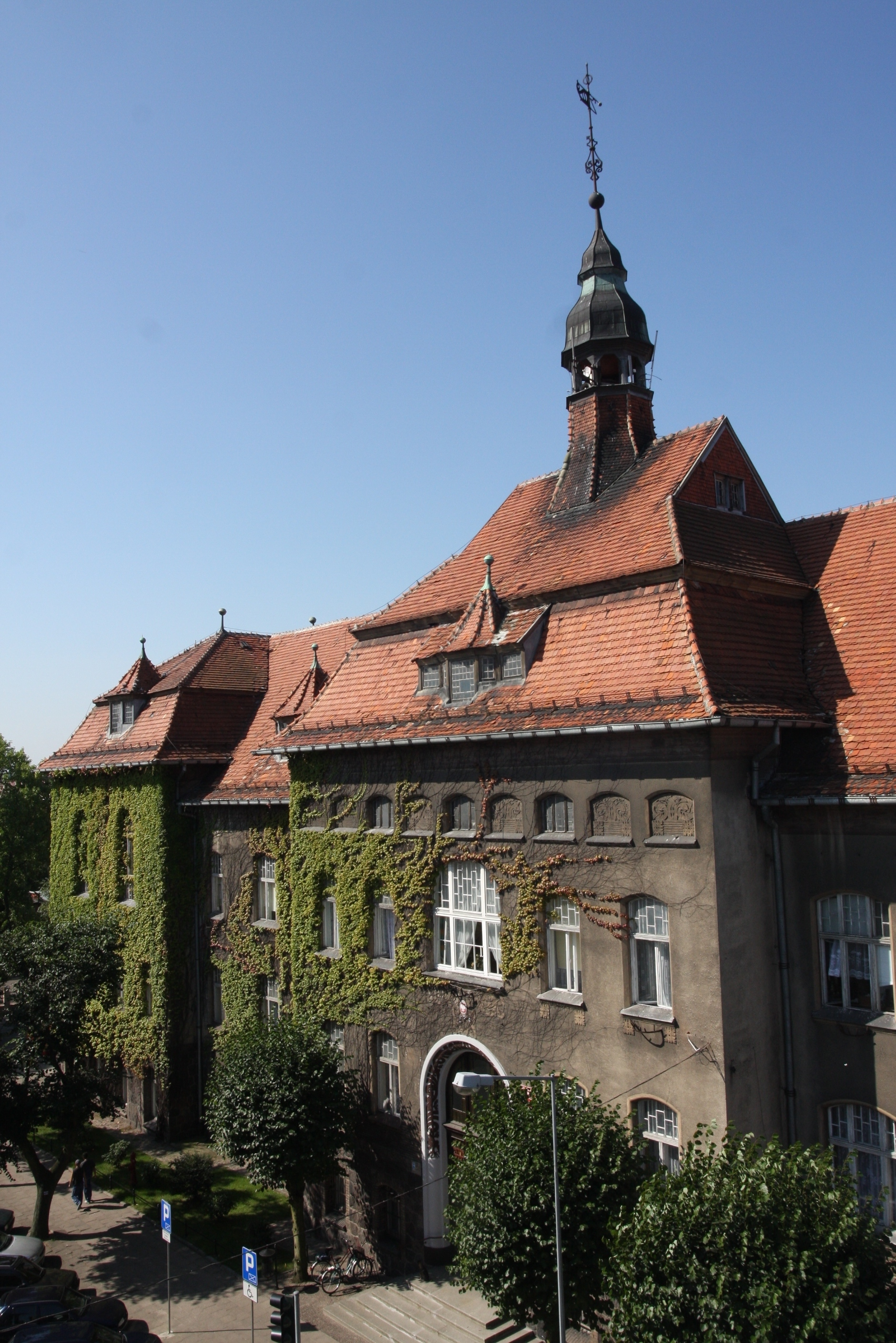 Ratusz Miejski w Sławnie